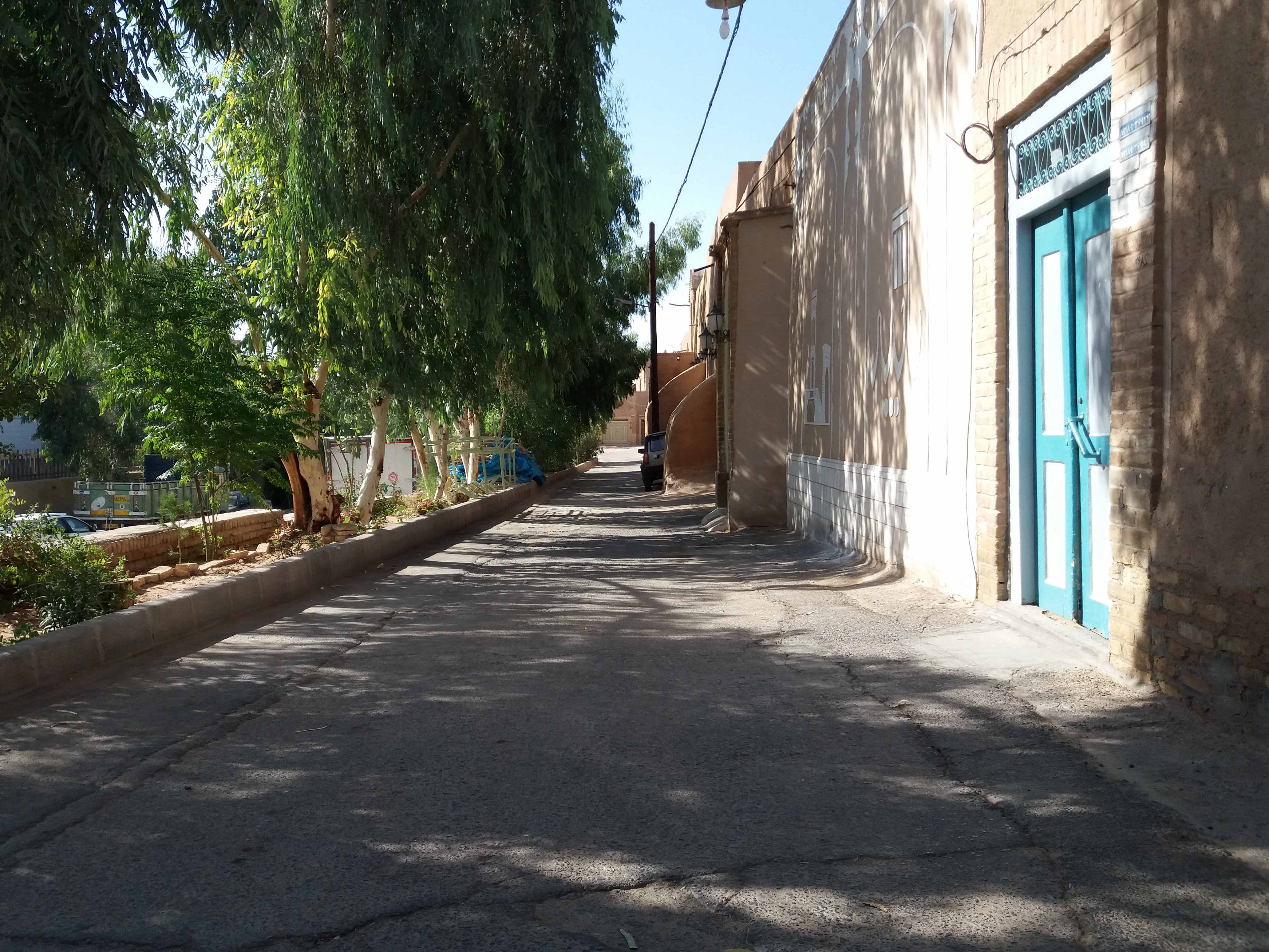 محل احتمالی بنای مدرسهٔ غیاثیه در کنار سیل گیر و رود خانهٔ چهار منار